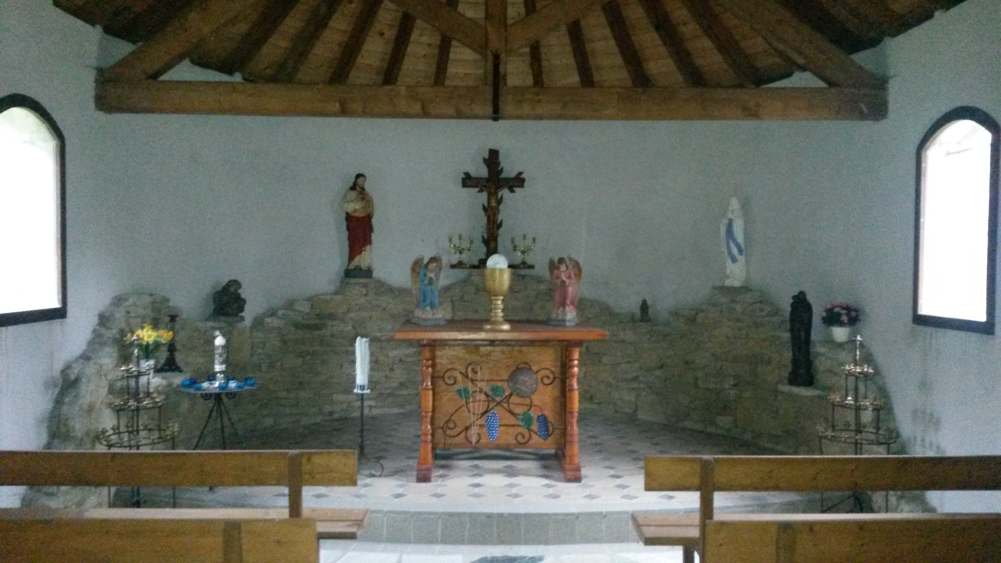 Cœur de la chapelle restaurée par les "Amis de la Chapelle". Le muret symbolise l'état des ruines retrouvées après la seconde guerre mondiale.